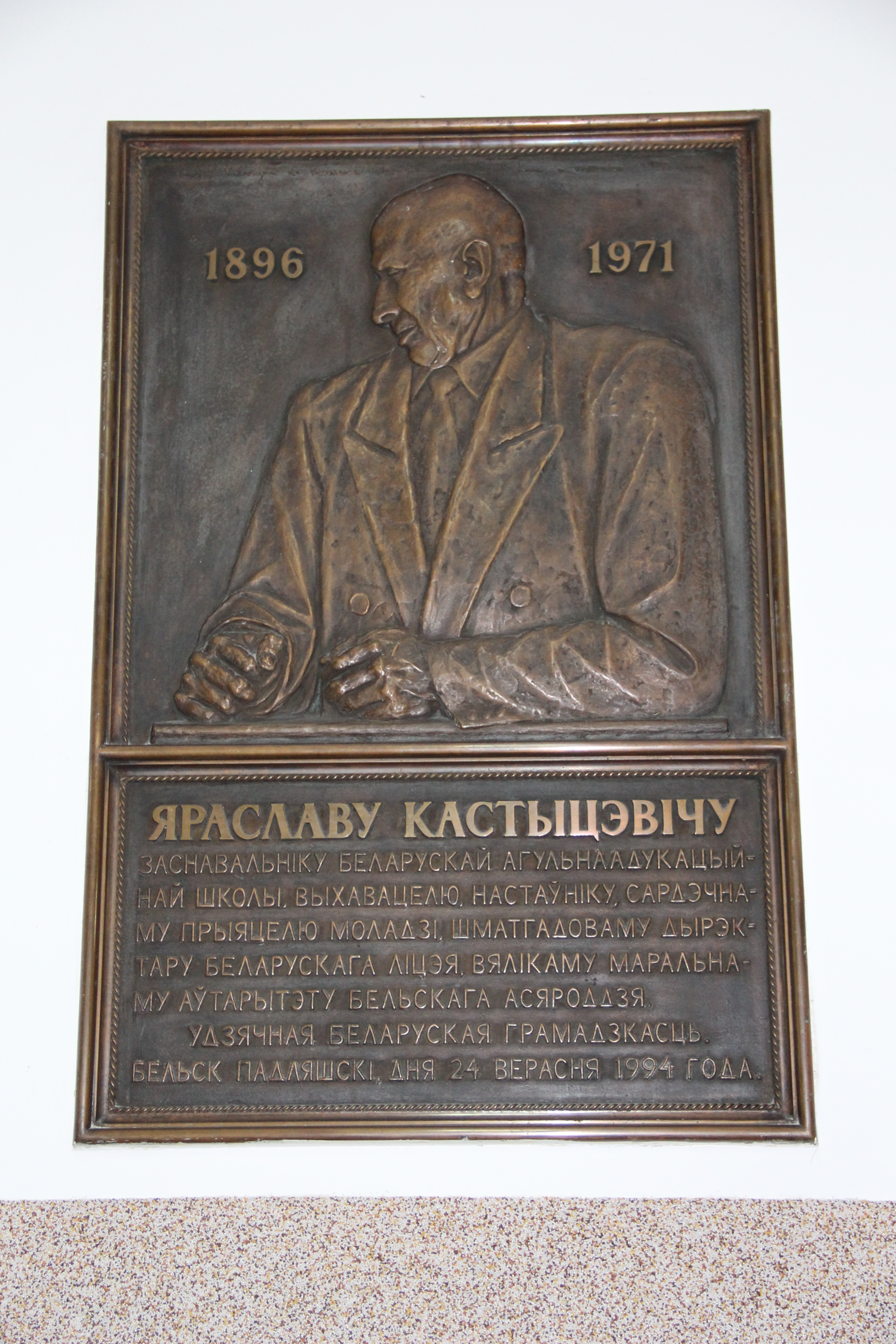 II Liceum Ogólnokształcące w Bielsku Podlaskim.